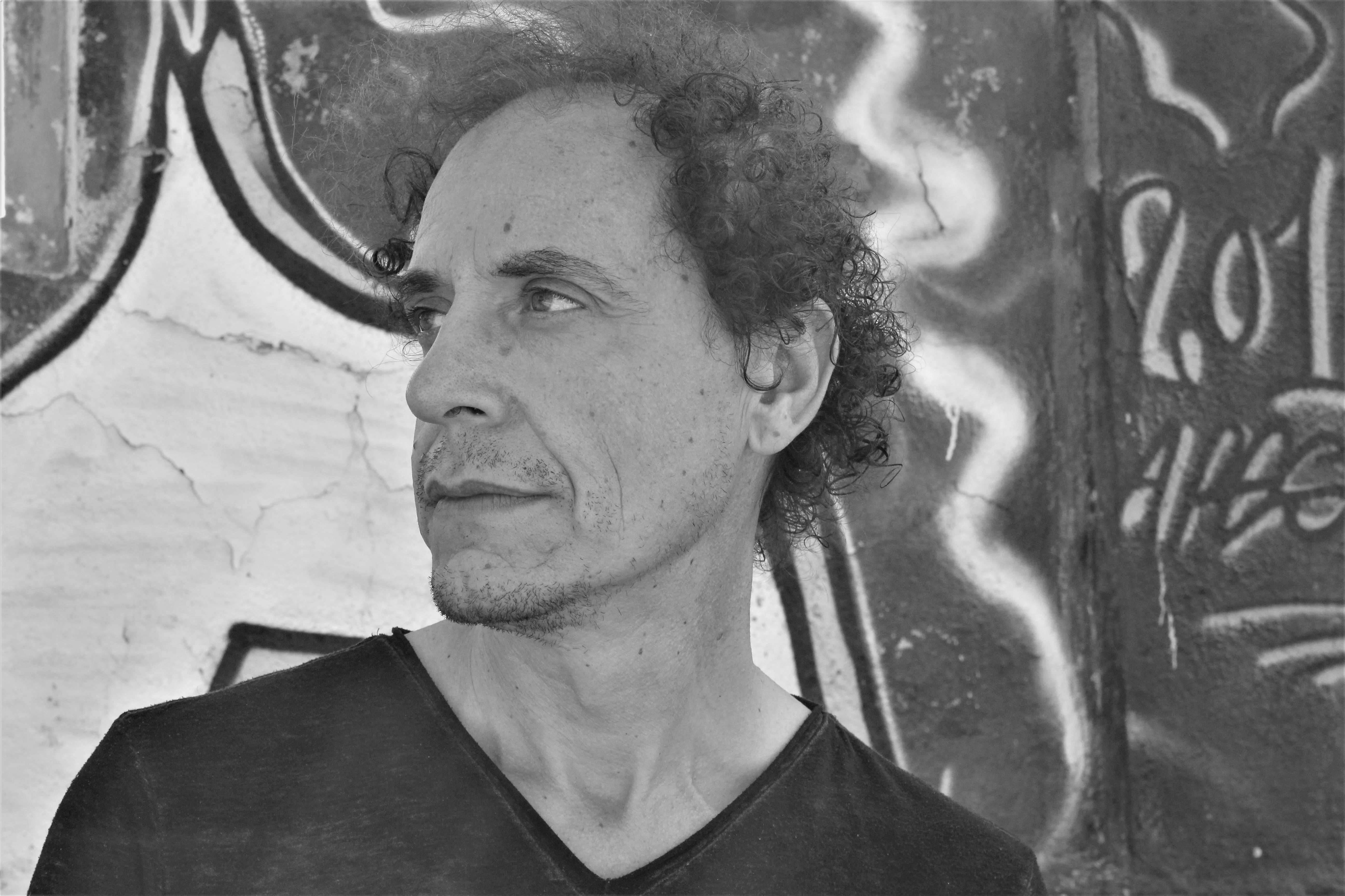 fotografia